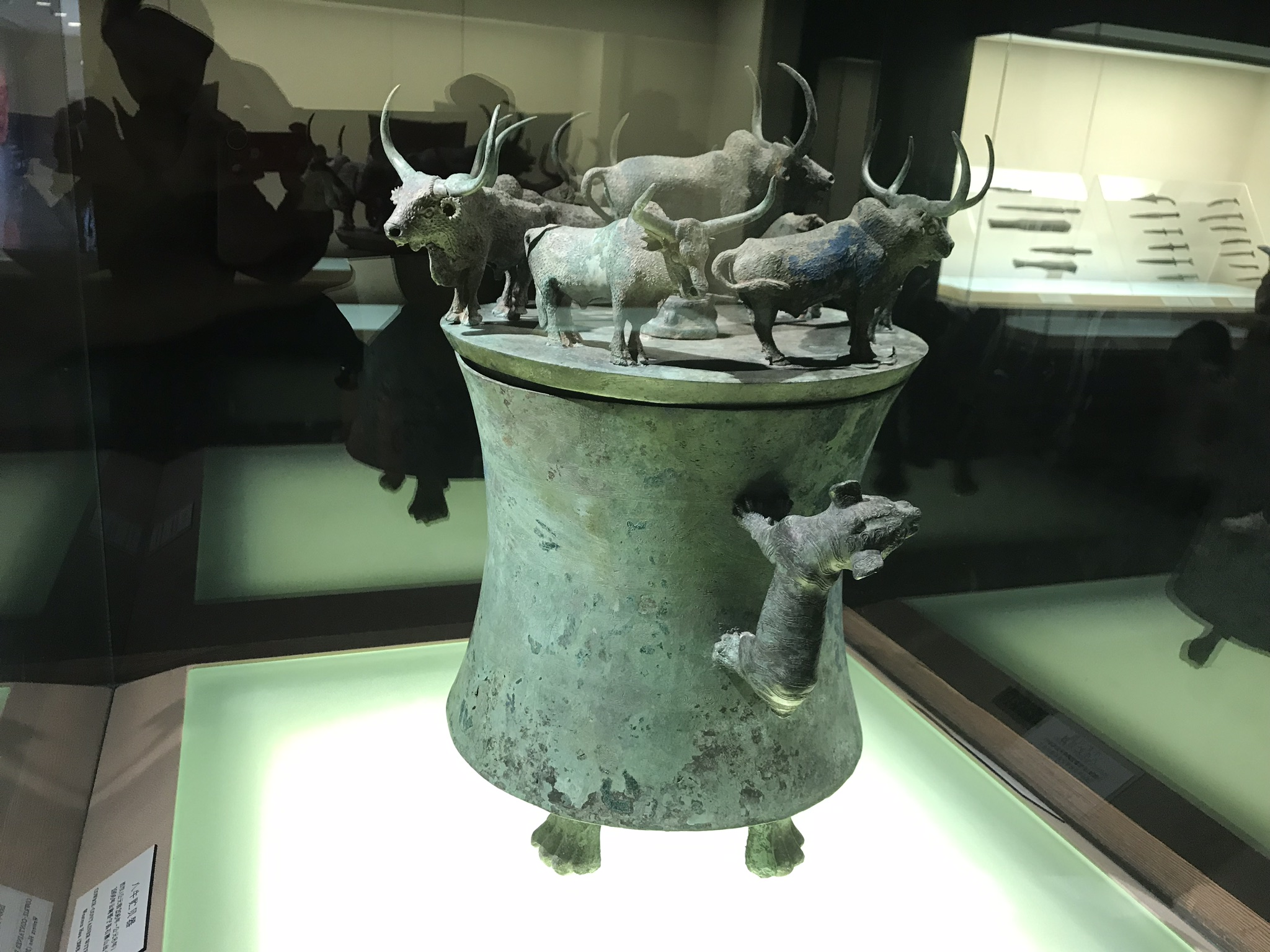 中文（中国大陆）: 古滇国贮贝器（上海博物馆藏）